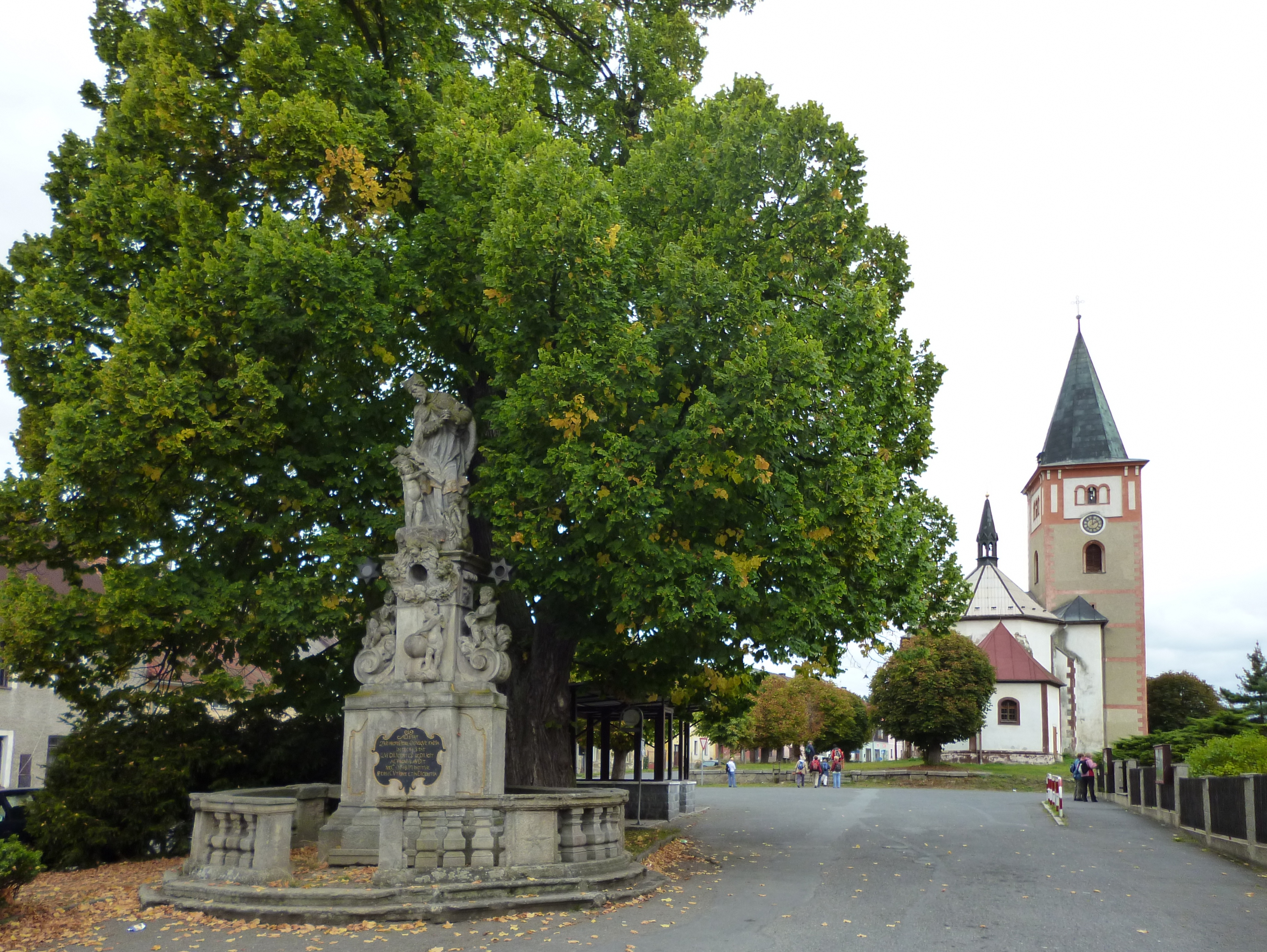 Kostel sv. Václava a socha Jana Nepomuckého ve Stráži